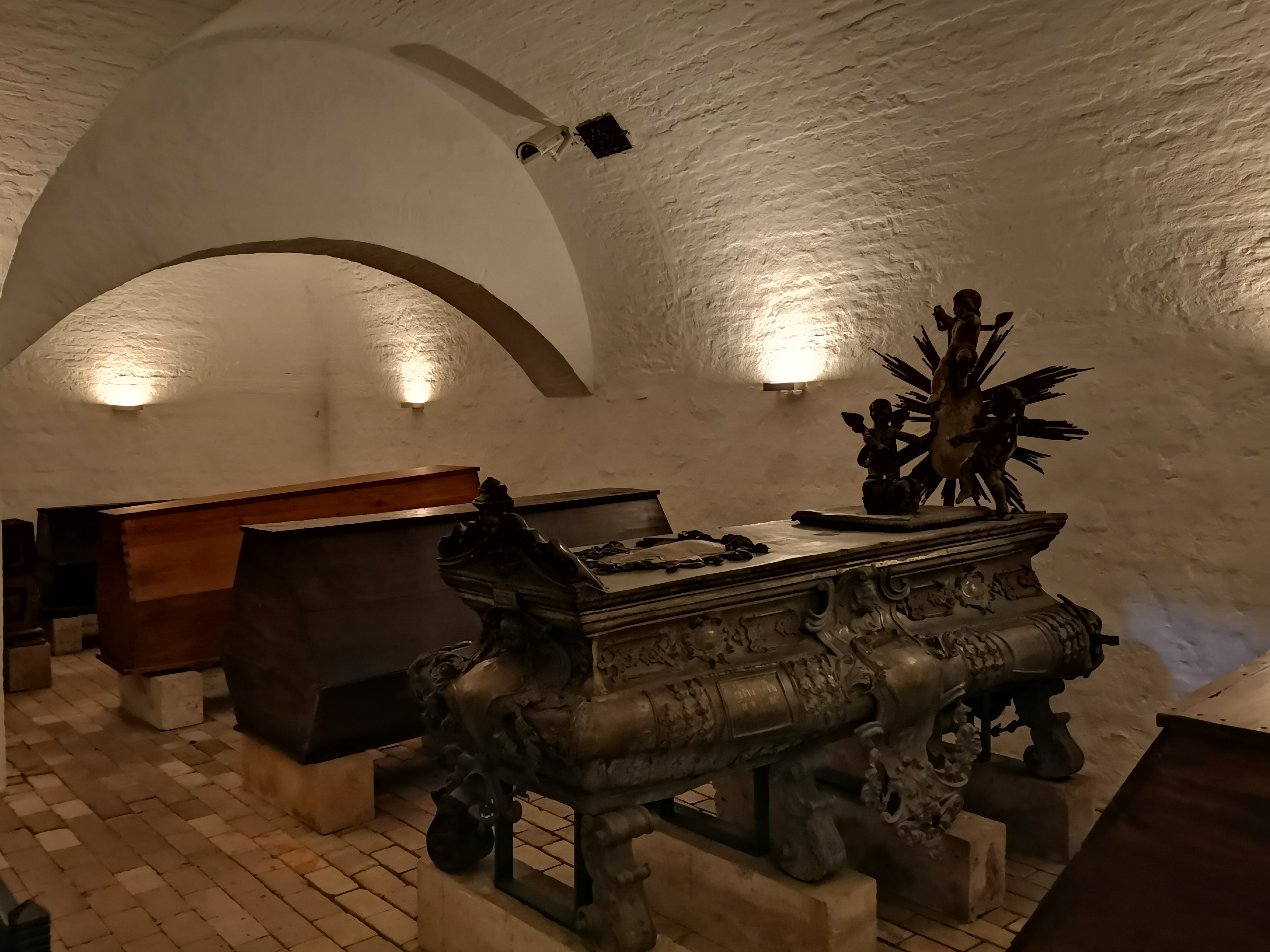 Fürstengruft Weimar, Sarg von Herzog Ernst August II. Constantin, Herzog Ernst August I. (1688–1748), Herzogin Eleonora Wilhelmina (von links nach rechts)